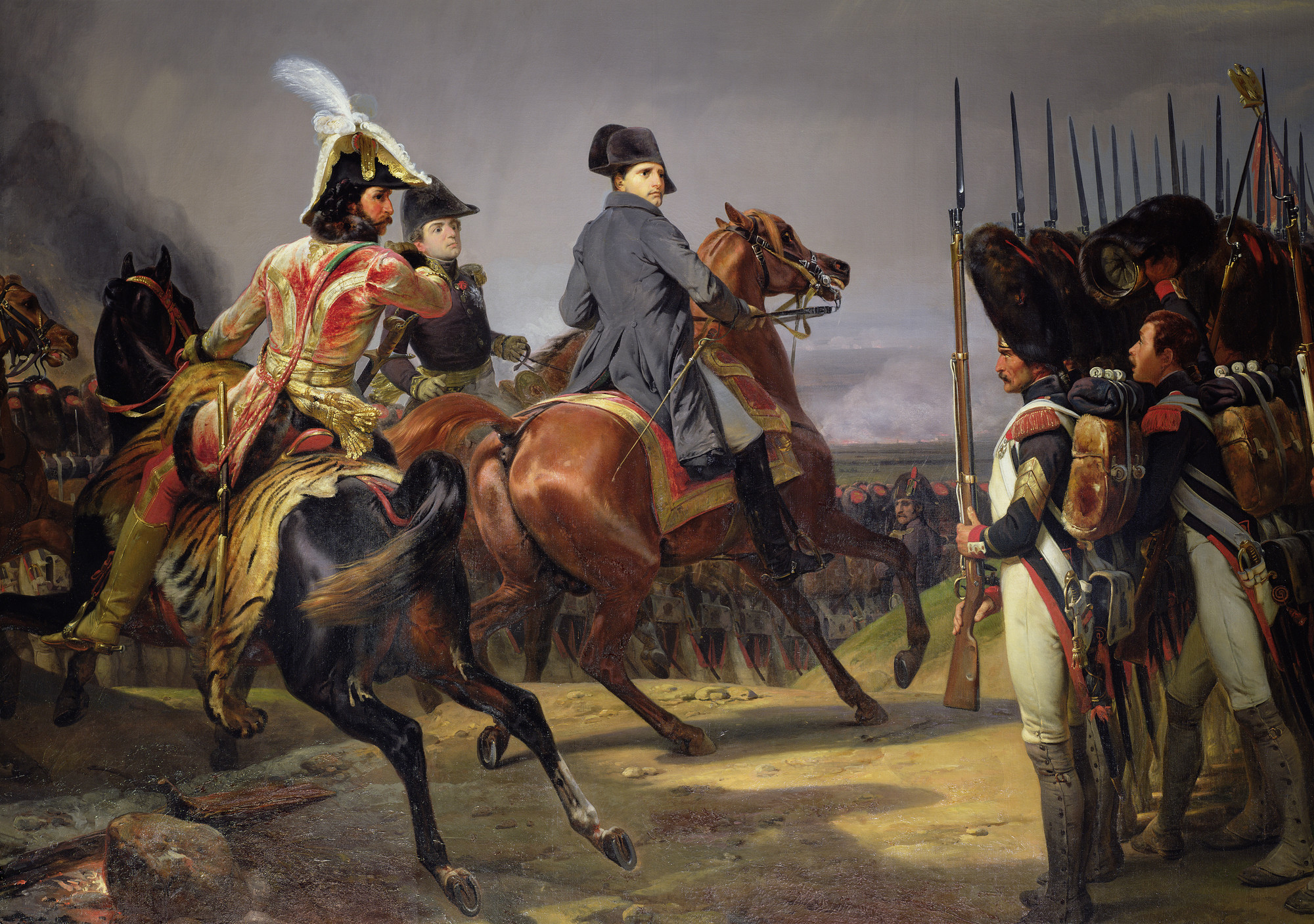 The Battle of Iena, 14th October 1806